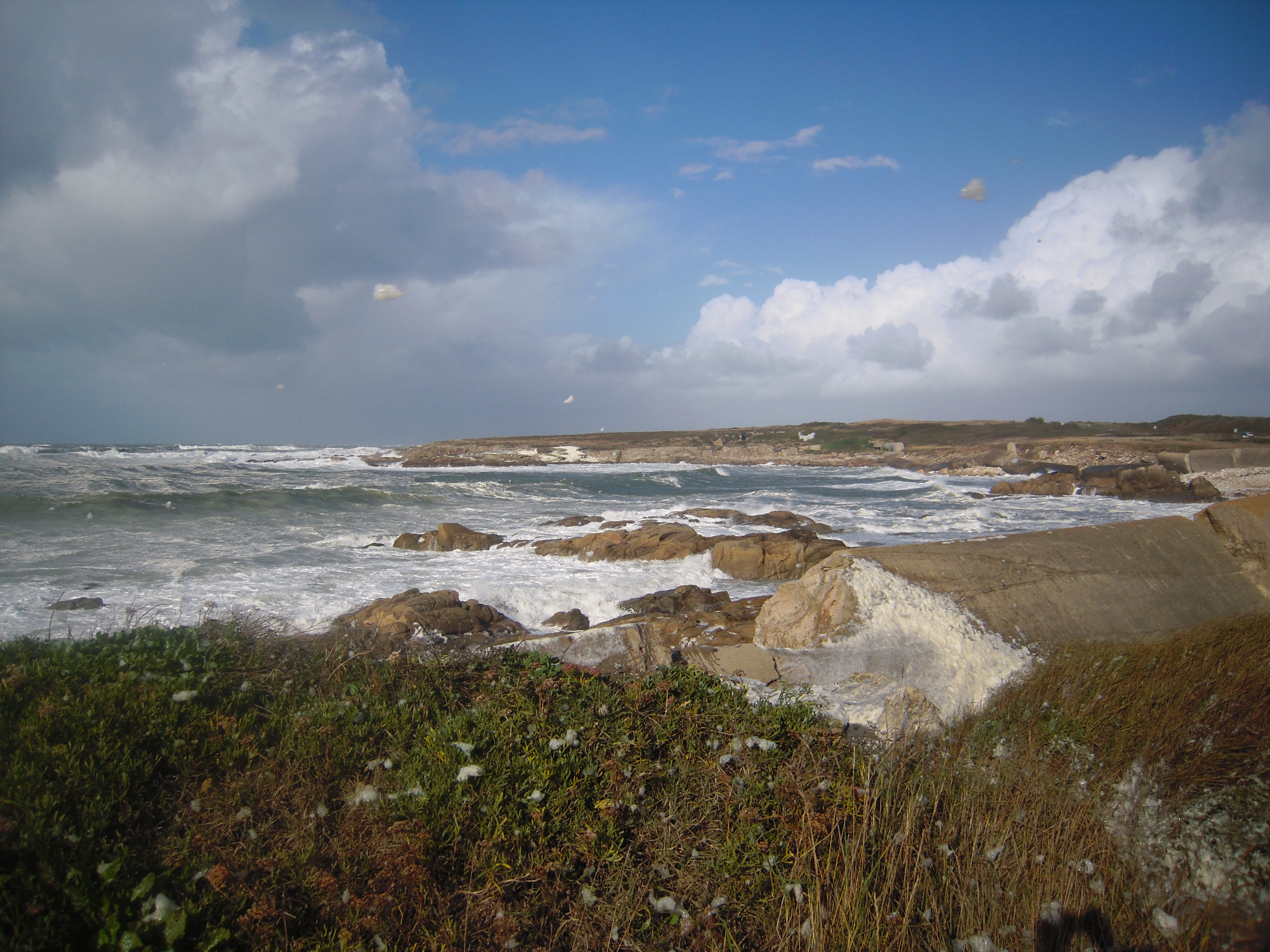 Tempête au Courégant à Ploemeur